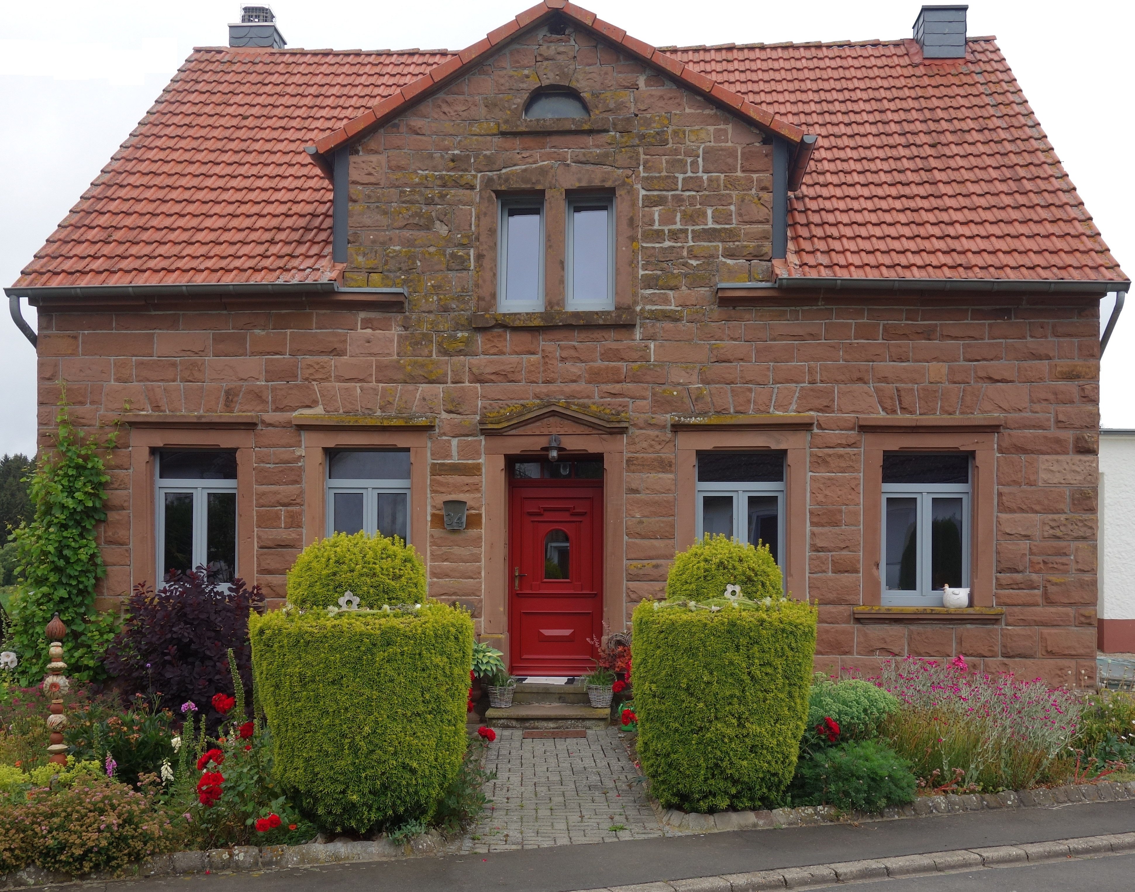 Fassade aus Eifeler Rotsandstein in Hillesheim-Niederbettingen